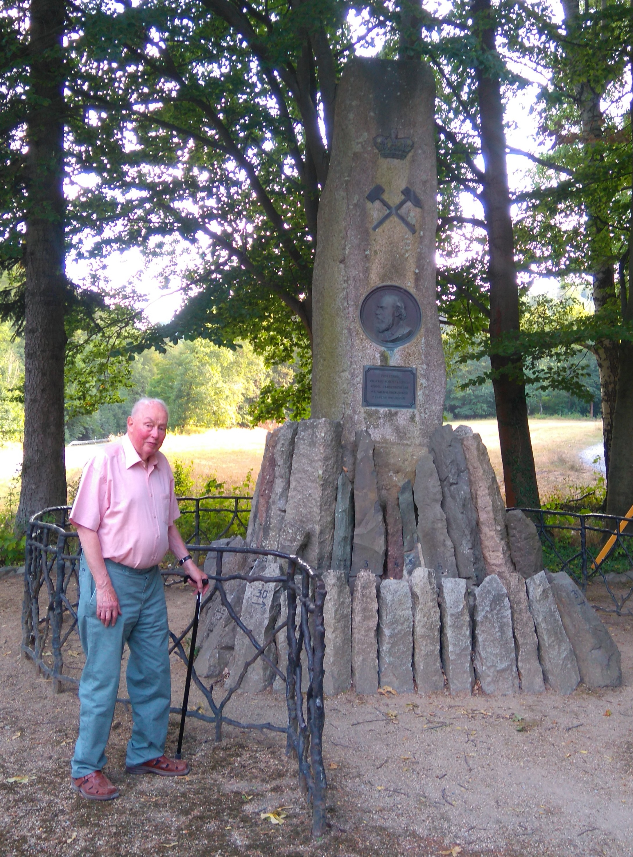 Reinhart Heppner (1931-2020) am Denkmal für den Geologen Karl August Lossen